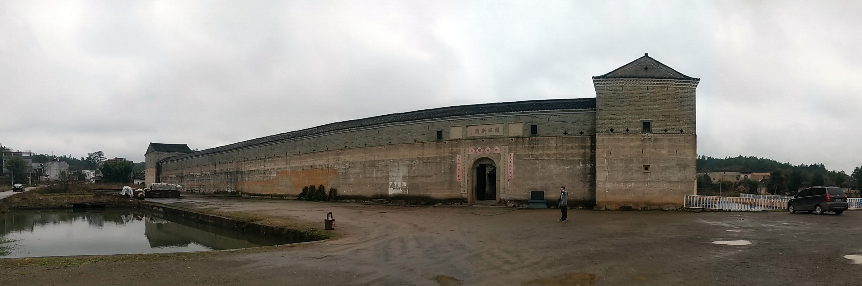 关西新围外观全景。